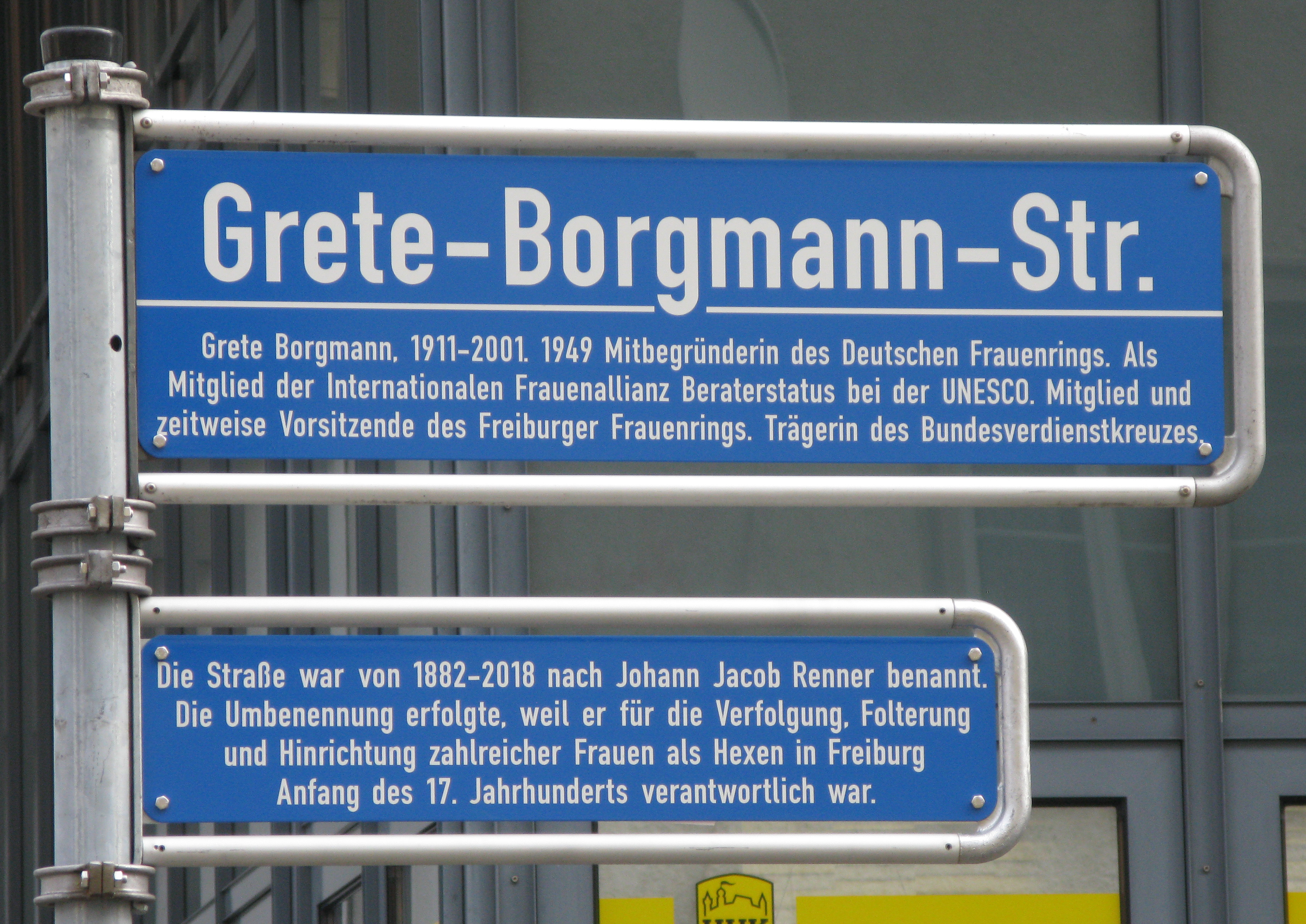 Grete-Borgmann-Straße in Freiburg-Stühlinger, bis 2018 Rennerstraße, Straßenschilder